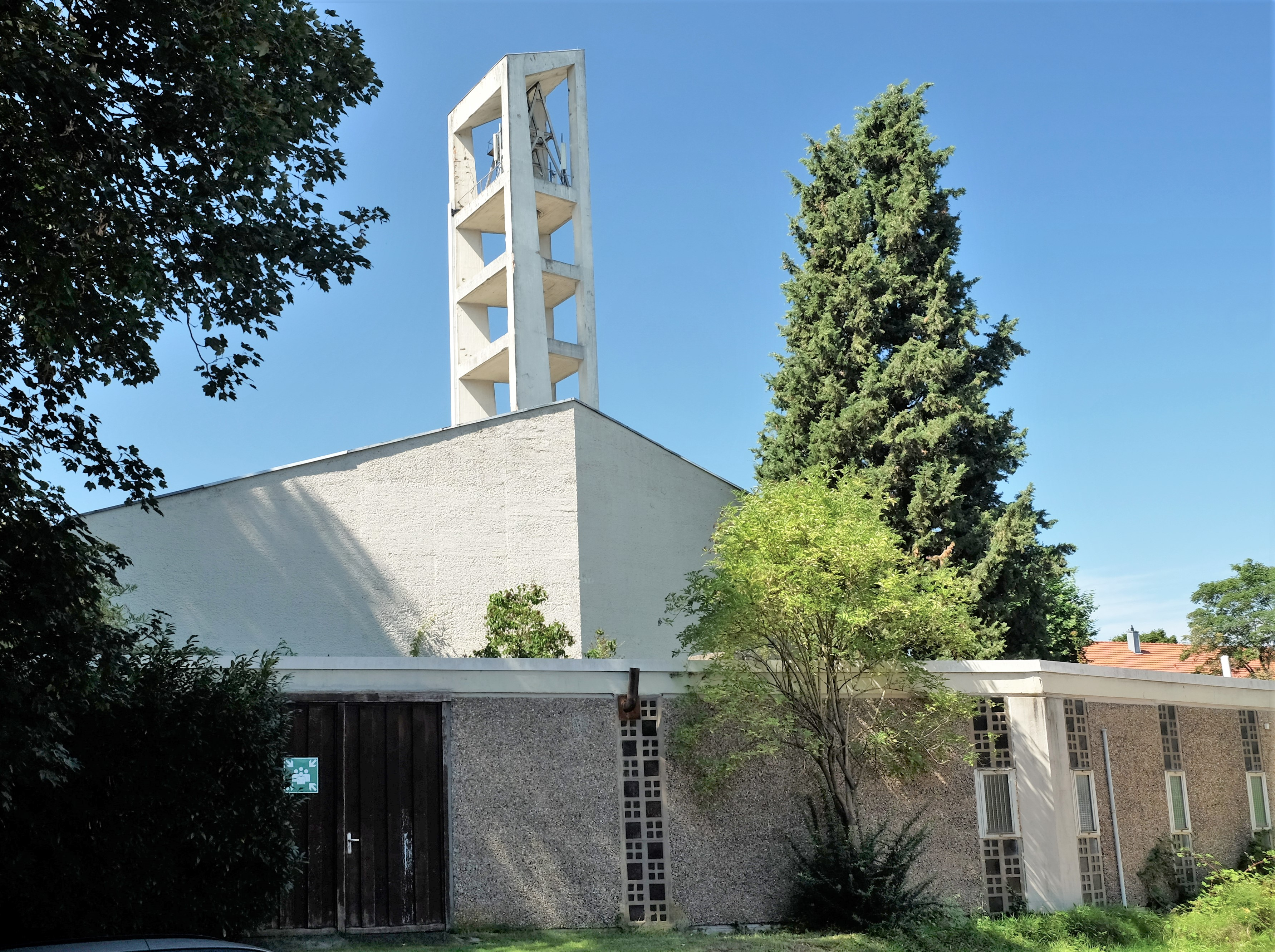 Baudenkmal in Alt-Saarbrücken, katholische Pfarrkirche Sankt Mauritius, Moltkestraße